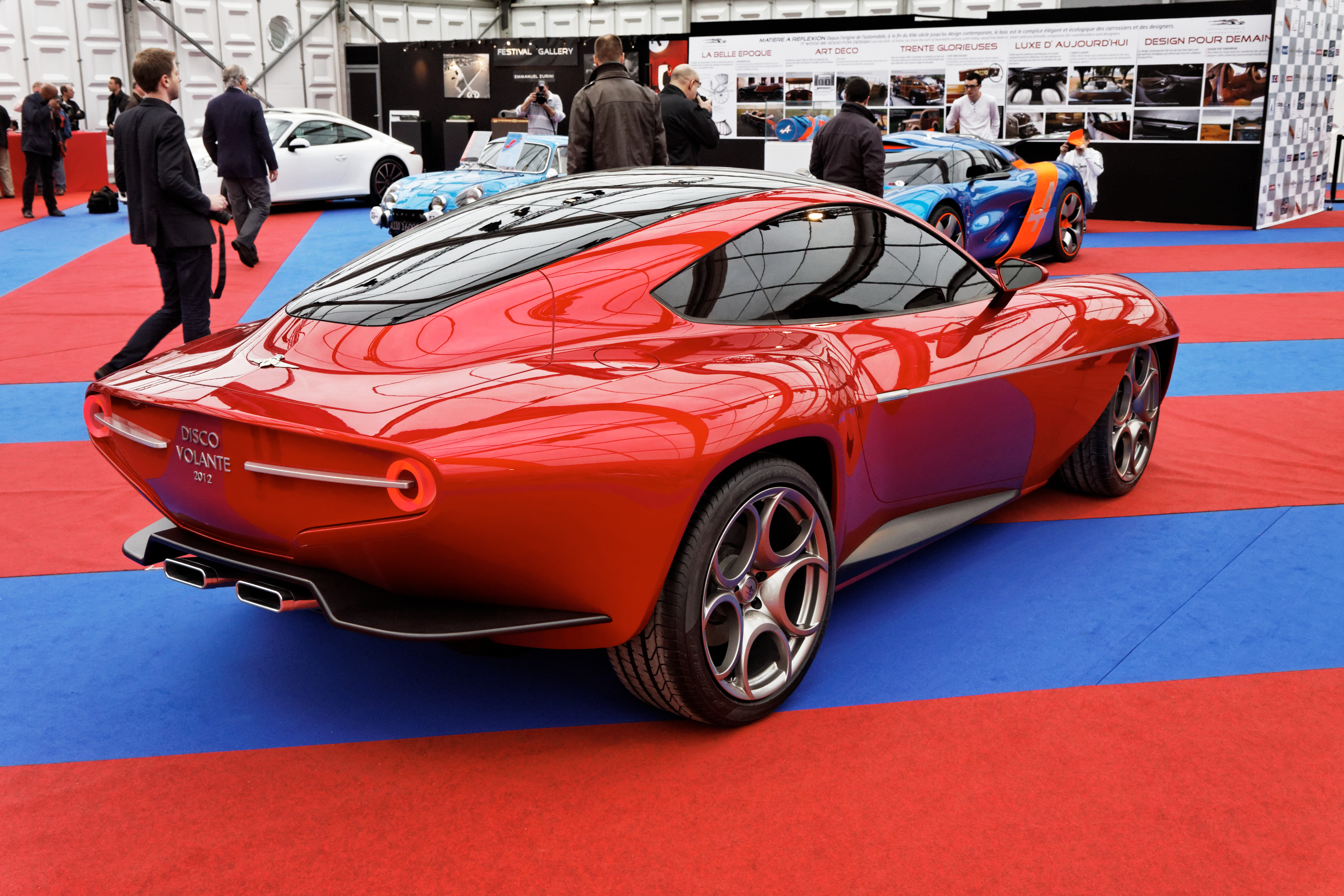 Une Disco Volante Concept 2012 exposée lors du festival automobile international 2013.